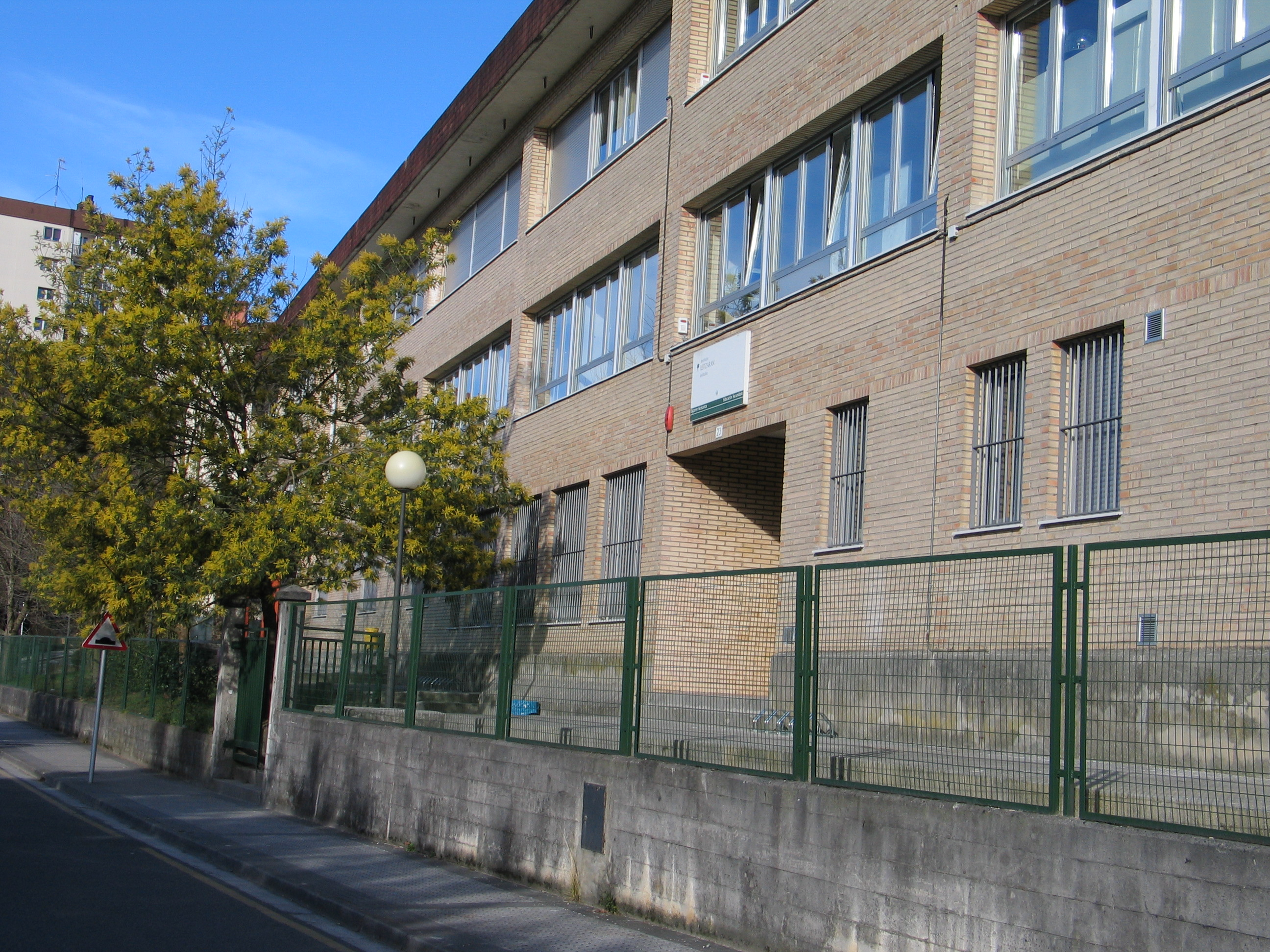 Andoaingo Institutua